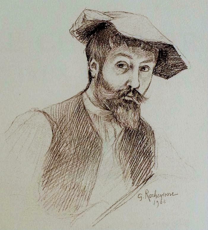 Autoportrait de Rochegrosse réalisé en 1908 et publié dans le livre de Charpentier "le Chevalier aux fleurs".